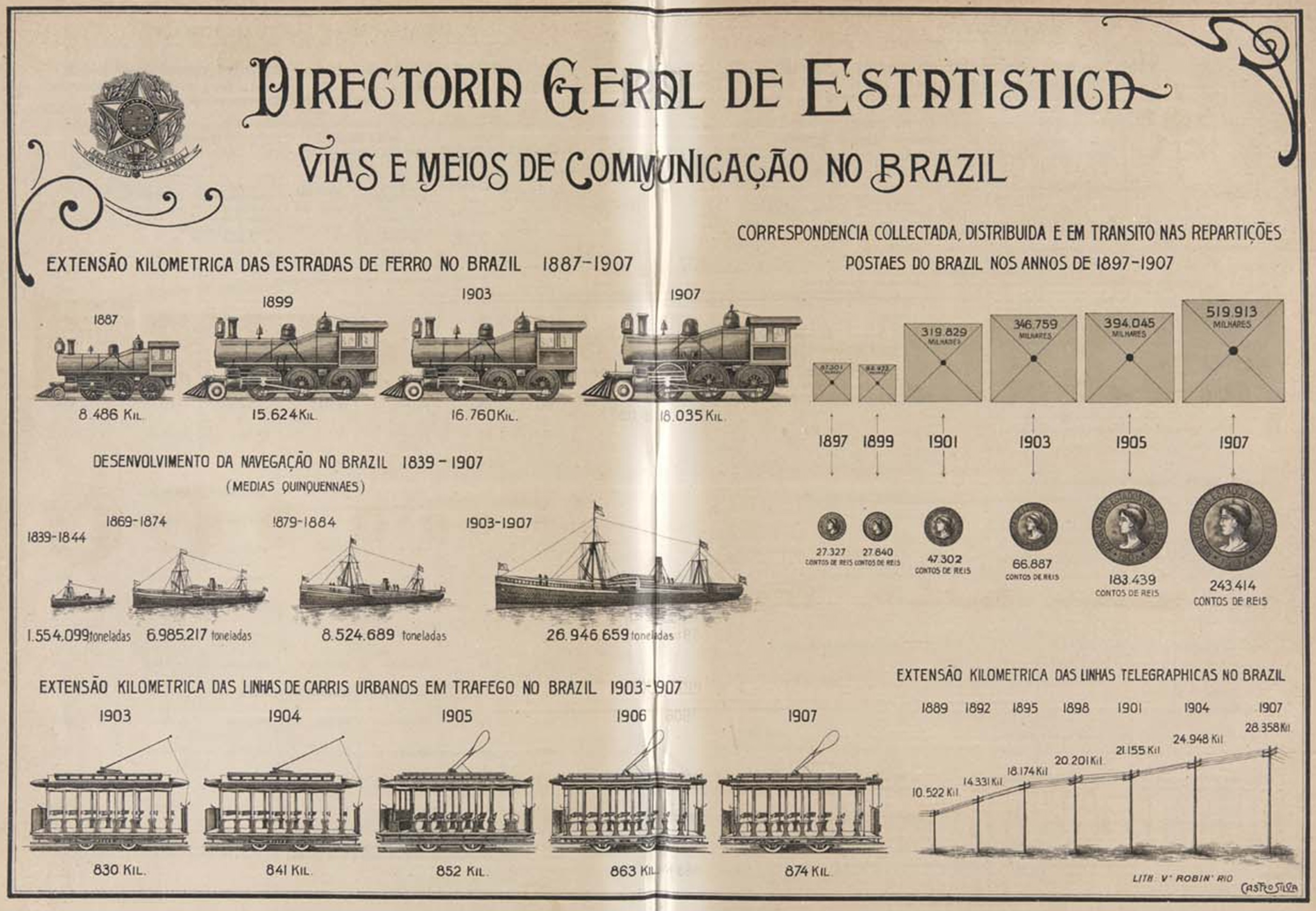 Vias e meios de comunicação no Brasil. Informações que integram o “Boletim Comemorativo da Exposição Nacional de 1908”